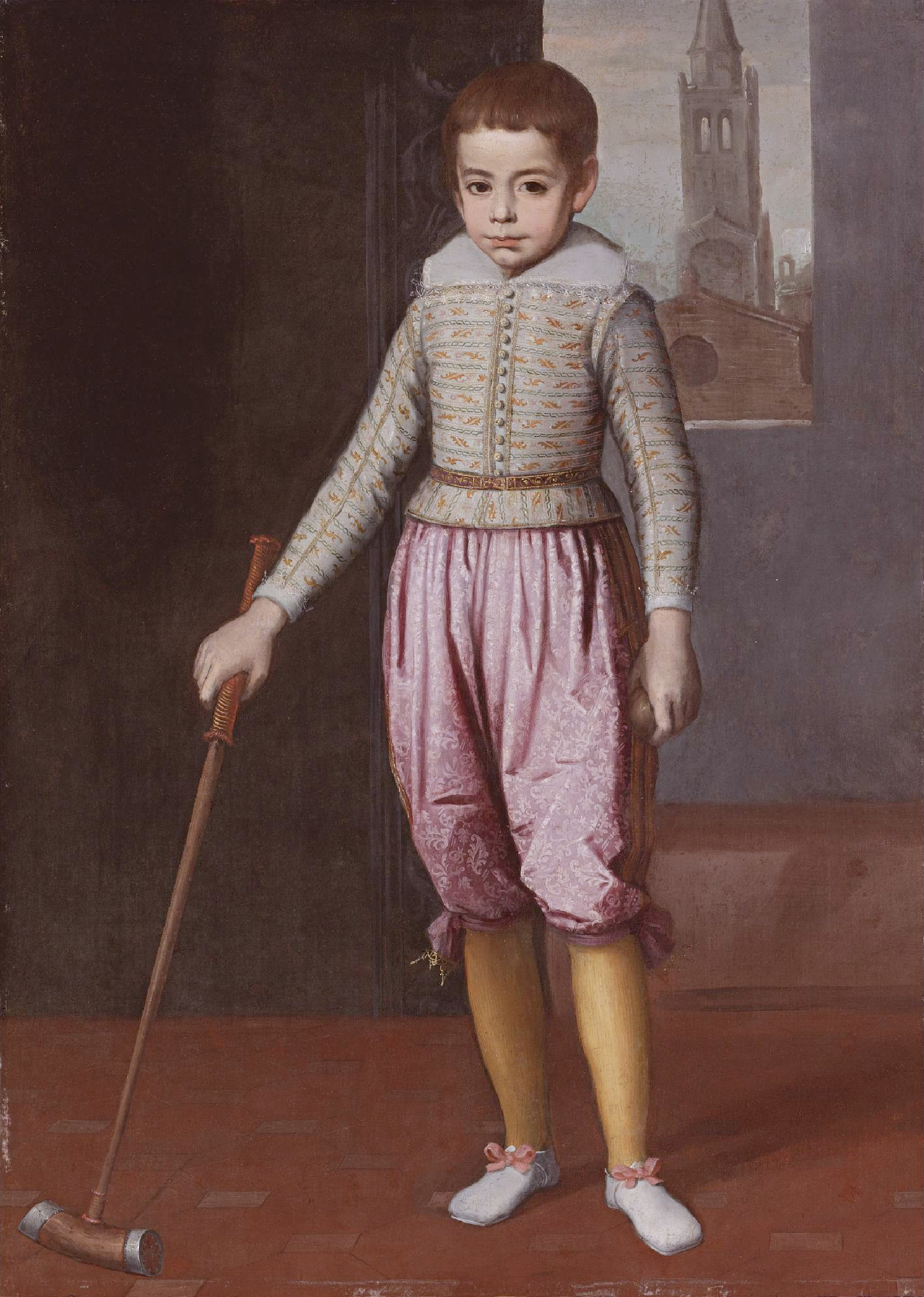 Portrait of Federico Ubaldo della Rovere (1605-1623)